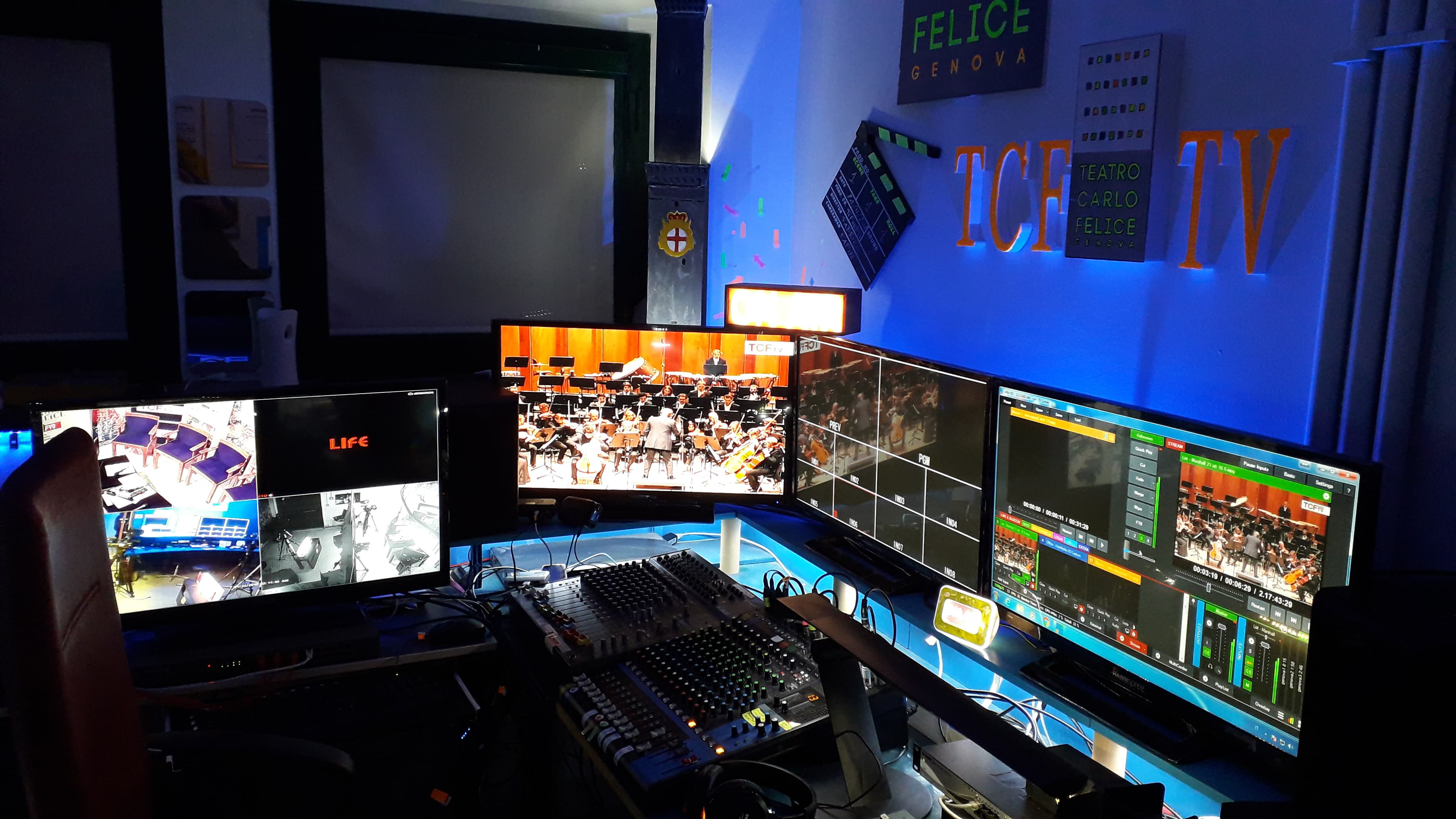 La messa in onda della TCF web Tv si trova al 6° piano del Teatro